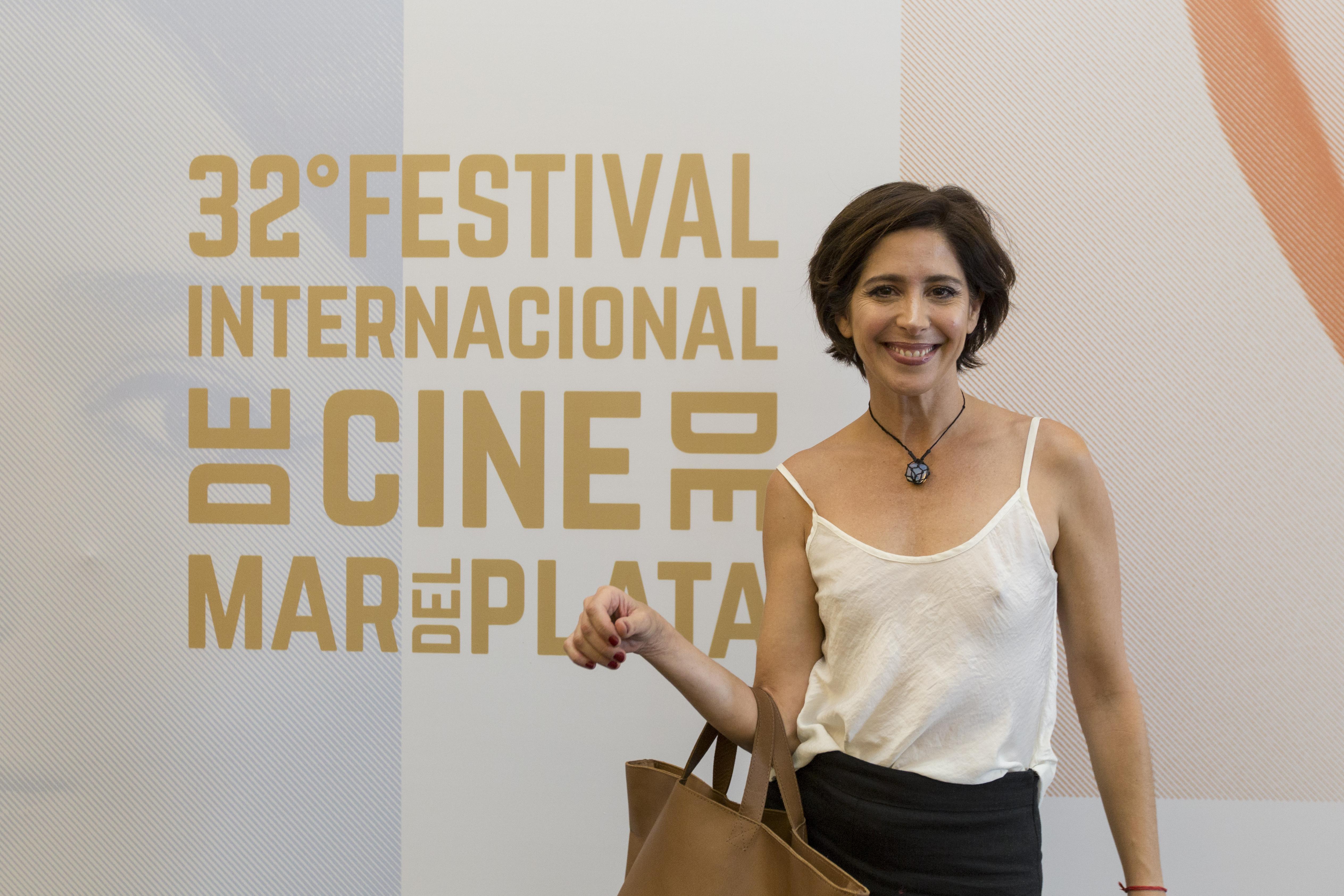 Mar del Plata, 17 de Noviembre de 2017.- Inauguró el 32º Festival Internacional de Cine. Foto: Soledad Amarilla / Ministerio de Cultura de la Nación Argentina.